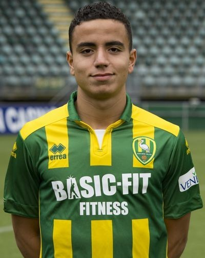 Aschraf El Mahdioui